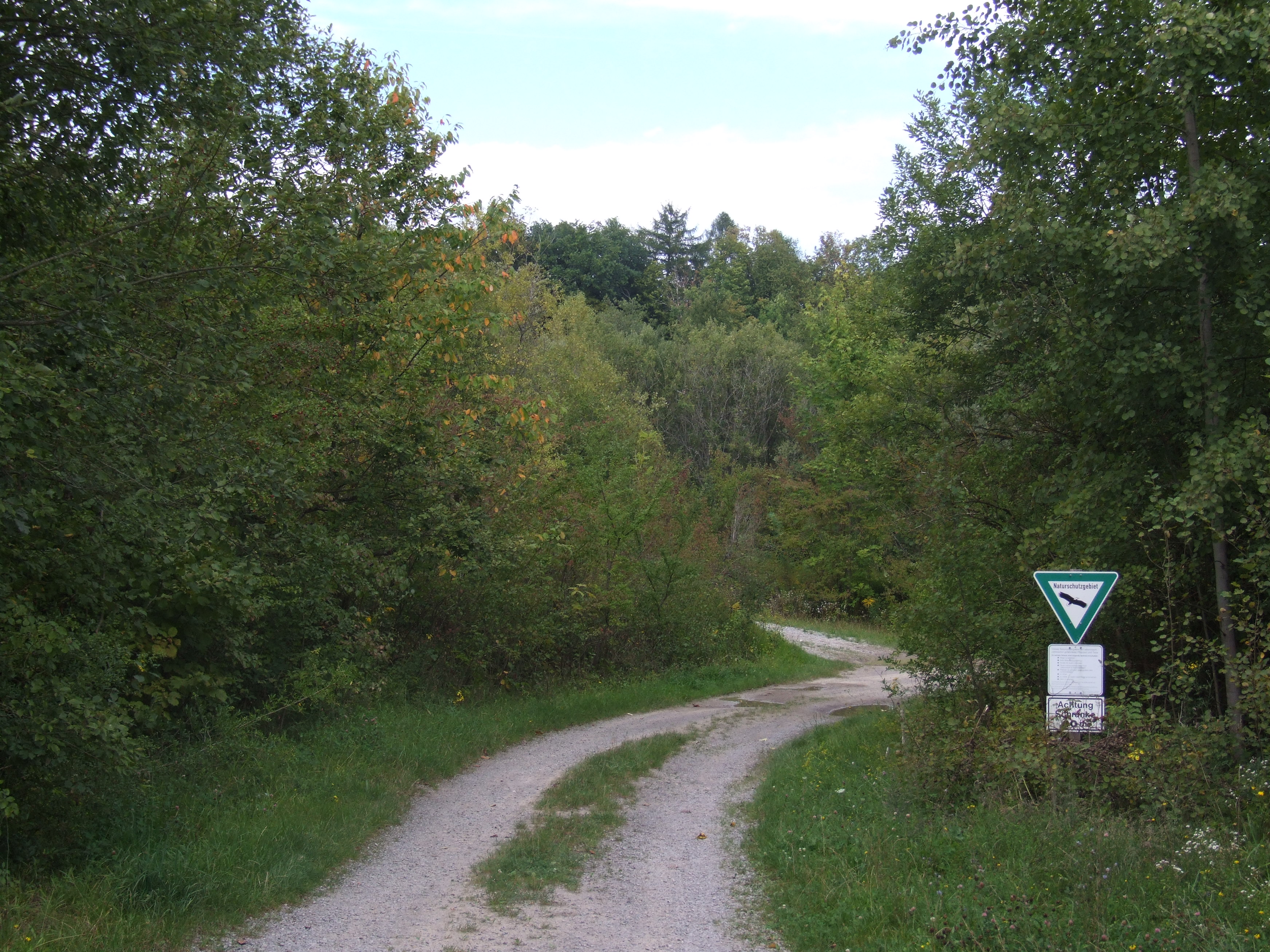 Naturschutzgebiet Kallenbert, Eschelbronn